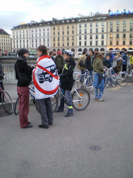 Une bannière anti-4x4